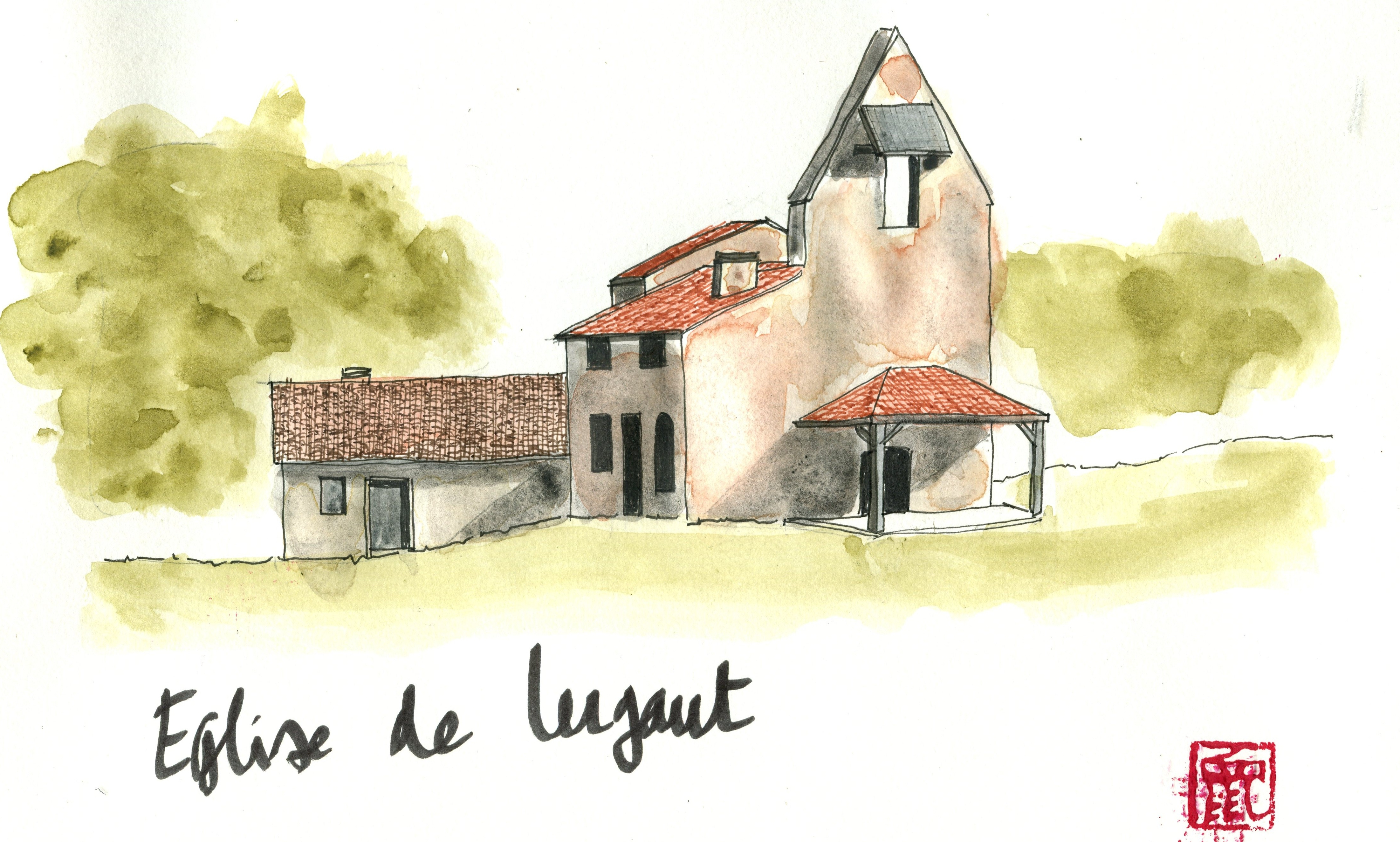 Aquarelle de la chapelle de Lugaut sur la commune de Retjons dans le département français des Landes.